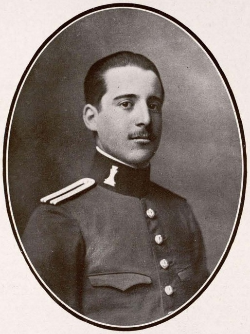 D. José María de Figueroa y Alonso Martínez, teniente de Ingenieros militares, que halló muerte gloriosa sobre el campo de batalla de África, por Franzen.